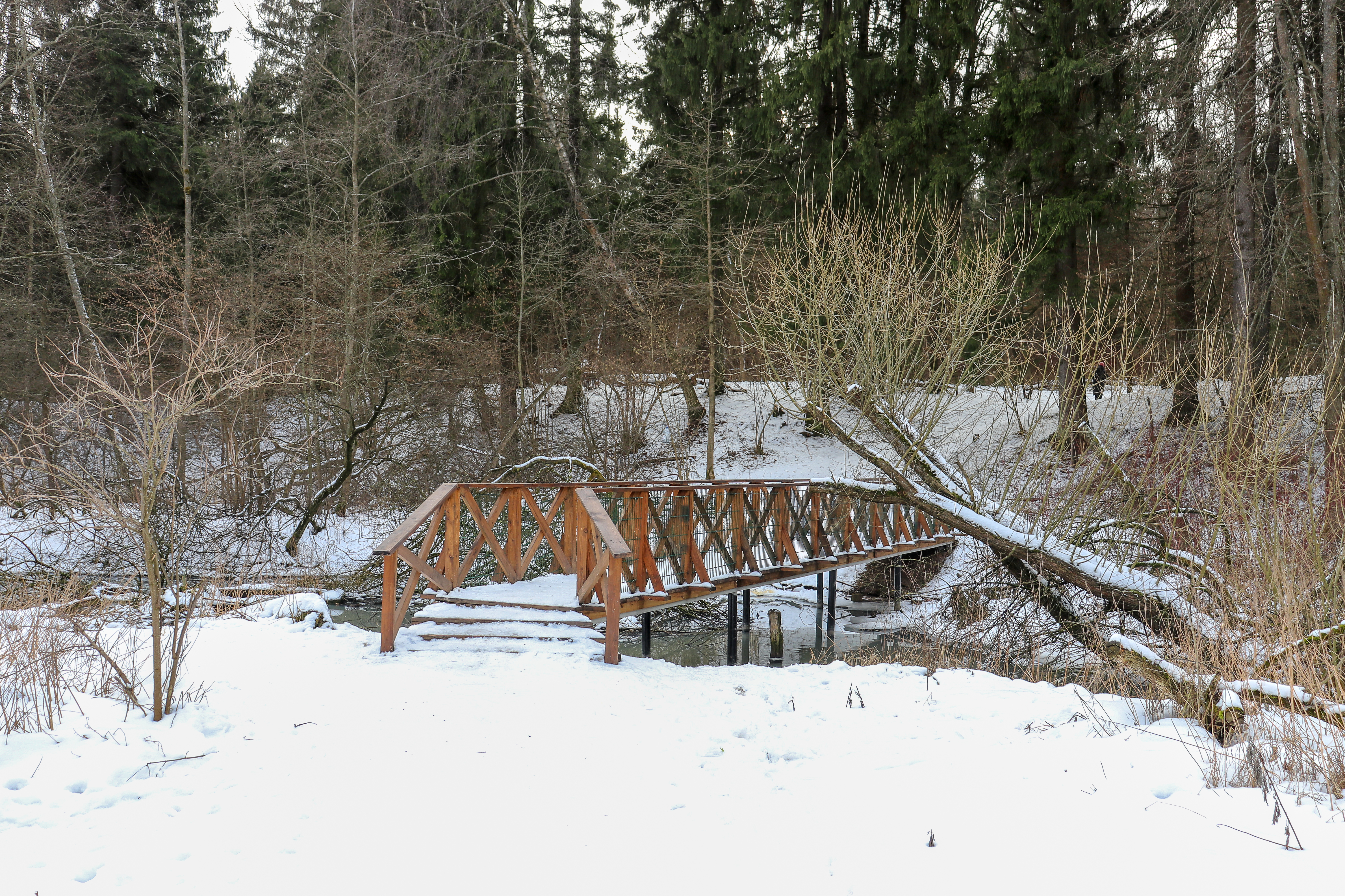 Пешеходный мост над рекой Ликовой в Валуевском лесопарке. Возведен осенью 2019 года